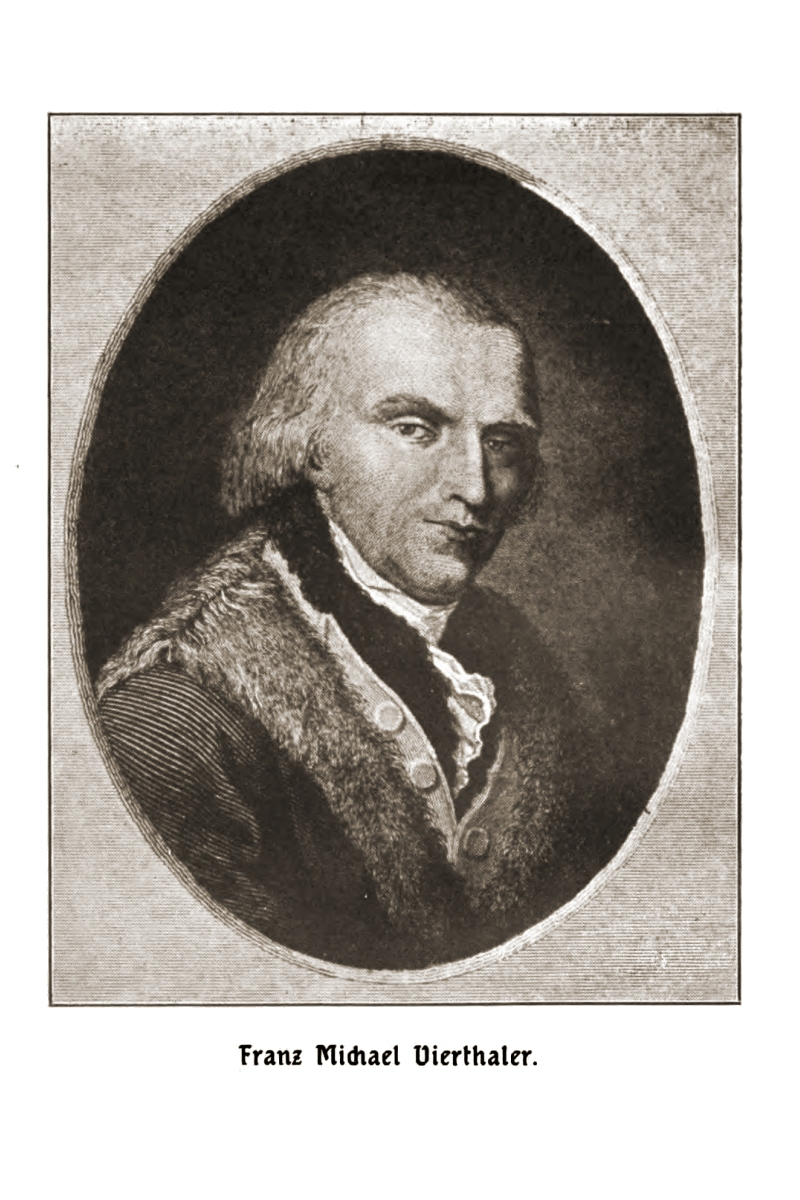 Franz Michael Vierthaler (1758-1827), nach einem Stich von Franz Xaver Eissner (1800-1869)